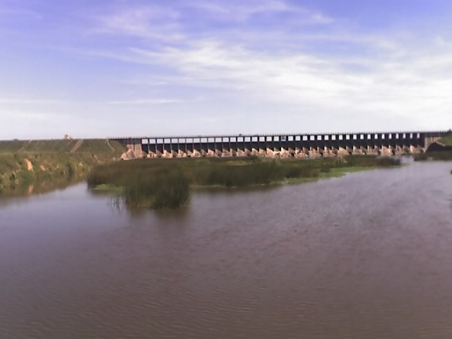 Dique Ingeniero Carlos Francisco Roggero, en la naciente del Río Reconquista, provincia de Buenos Aires.